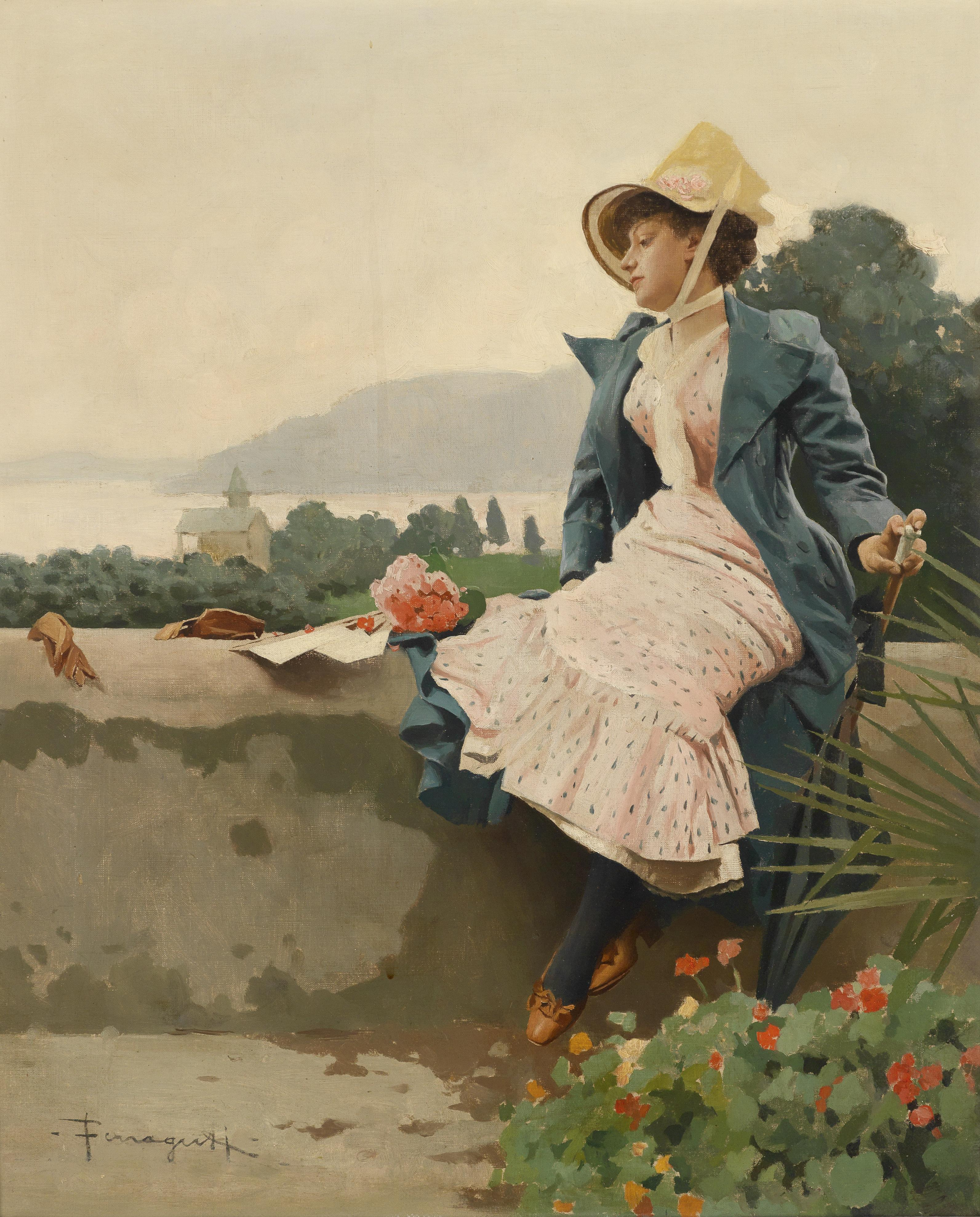 In Erwartung